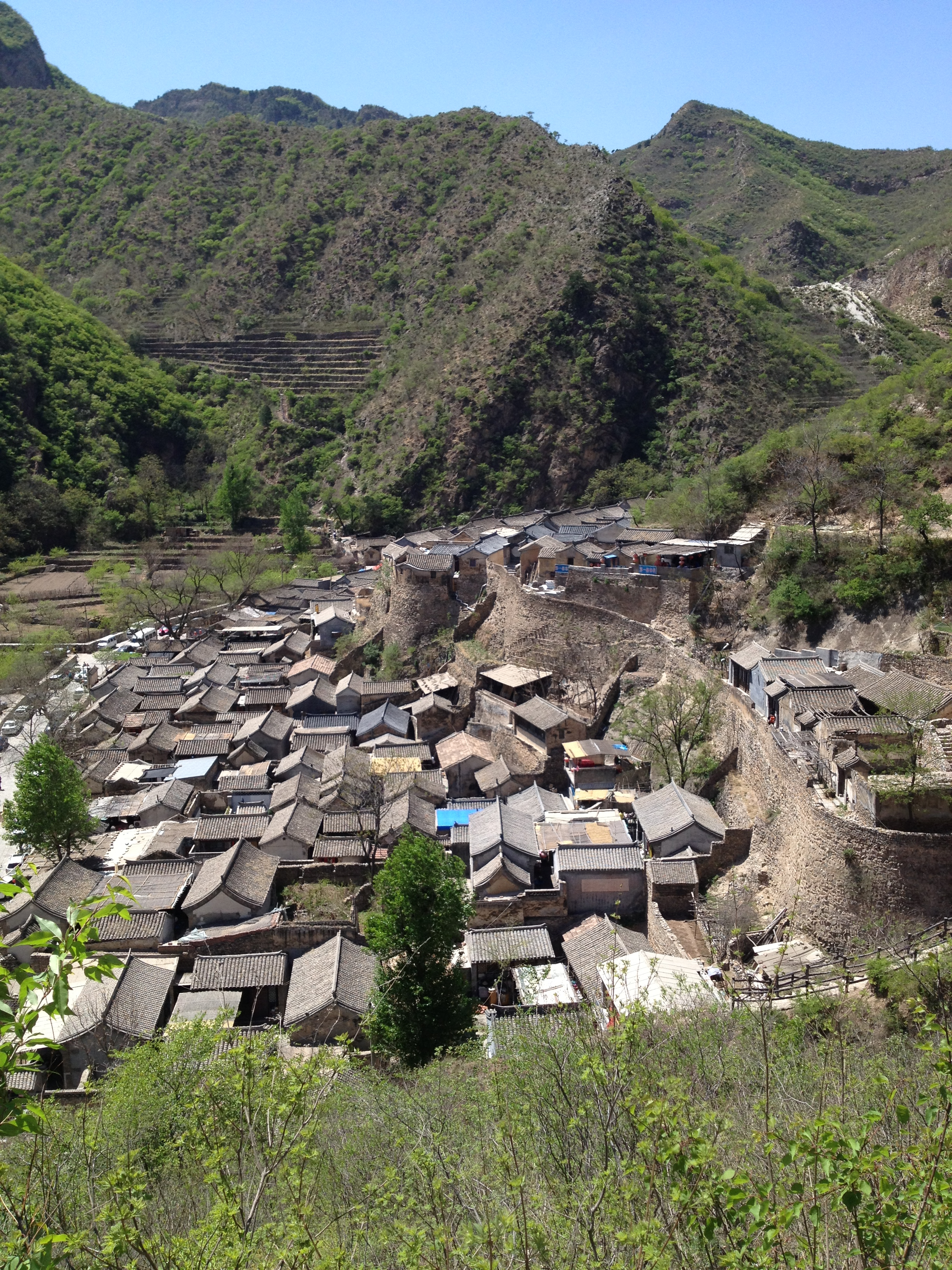 中文（中国大陆）: 北京西郊门头沟区斋堂镇爨底下村